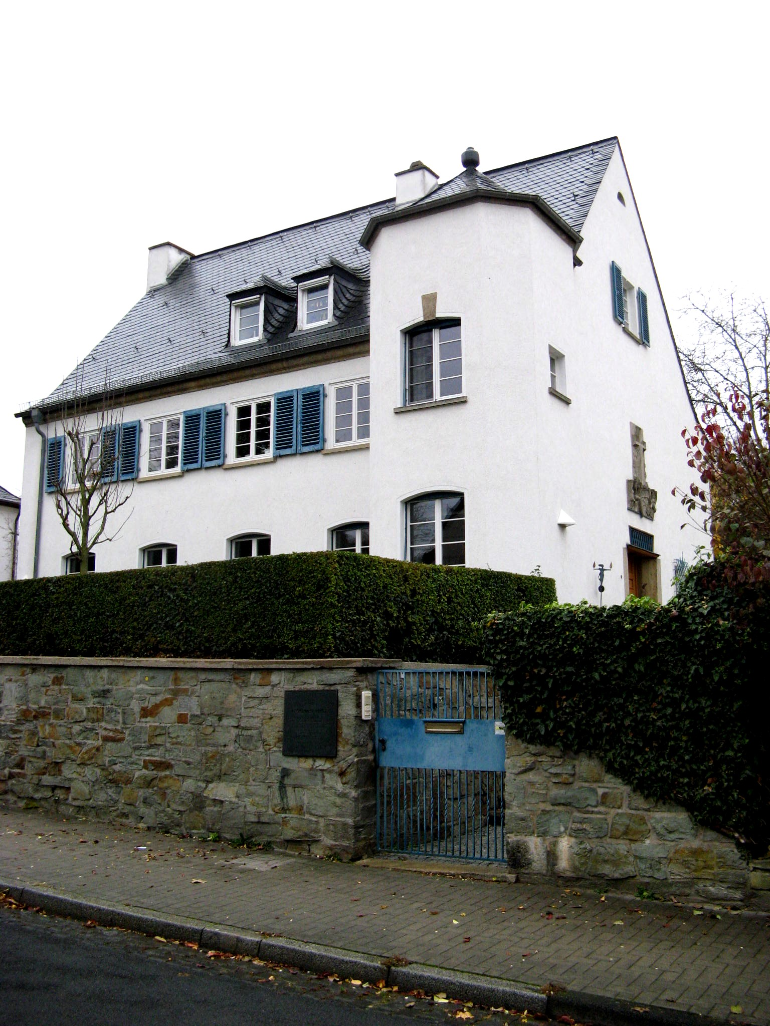 Niemöllers Haus in Wiesbaden Brentanostr